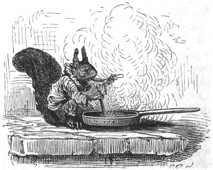 Szene aus dem Märchen Der Zwerg Nase von Wilhelm Hauff: Der in ein Eichhörnchen verwandelte Jakob als Koch